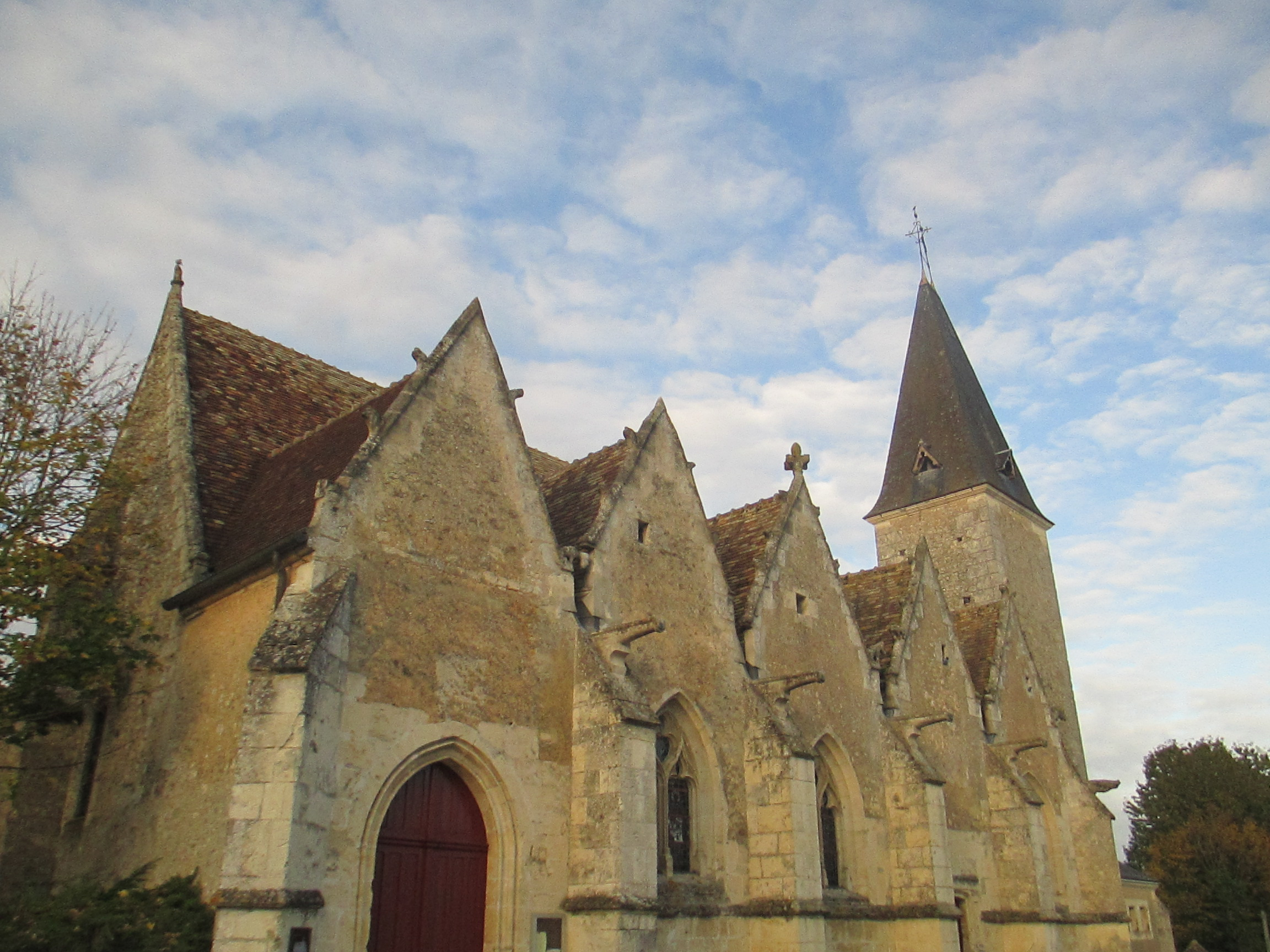 Église Saint-Jouin de Dancé, dans l'Orne. .